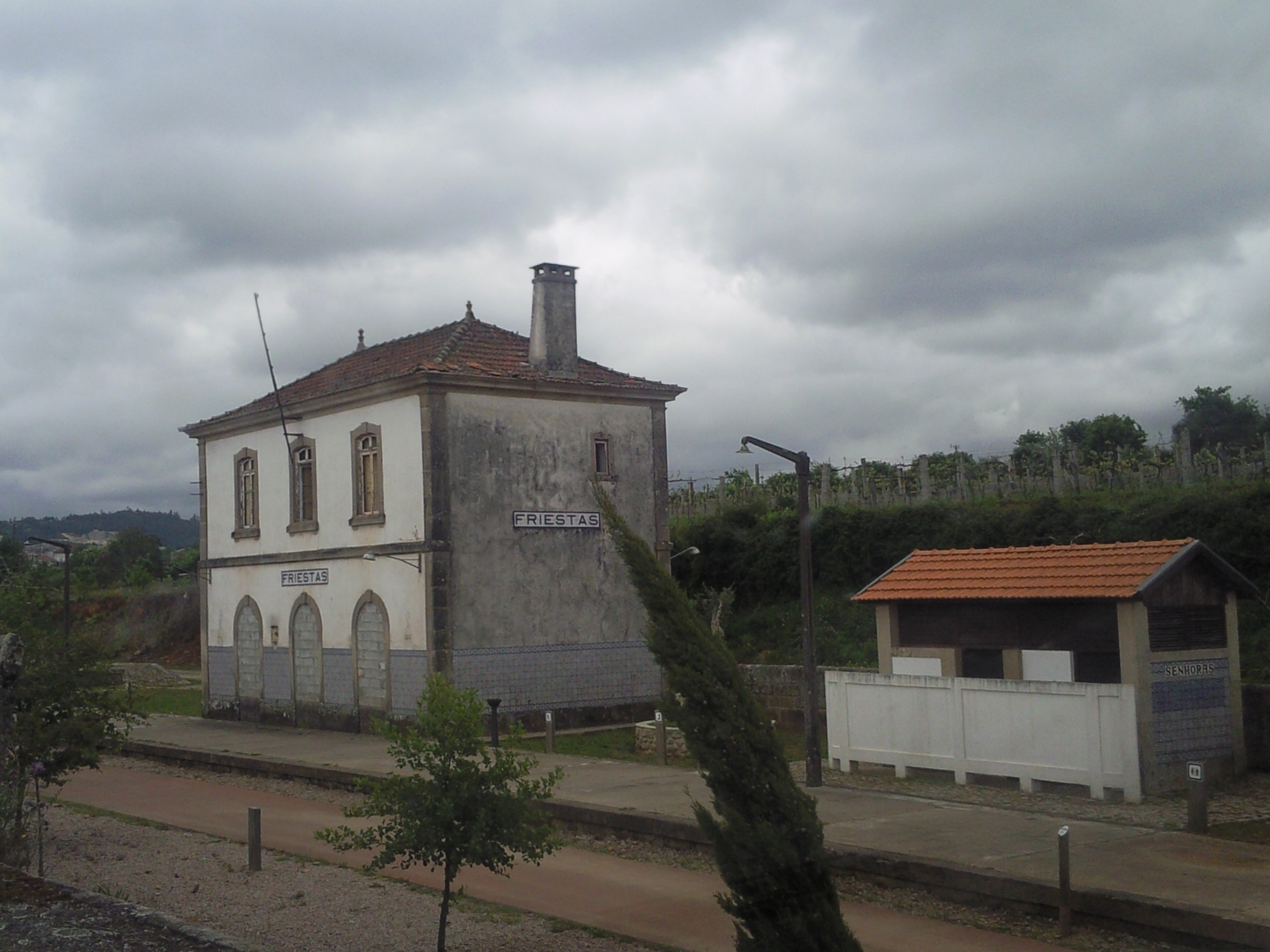 Antigua estación de tren de Friestas